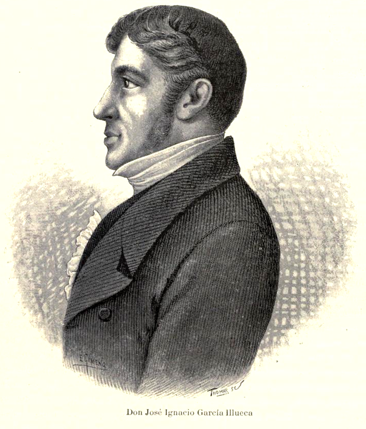 Imagen extraida del libro de Vicente Riva Palacio, Julio Zárate (1880) "México a través de los siglos" Tomo III: "La guerra de independencia" (1808 - 1821)